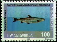 Salmo ohridanus